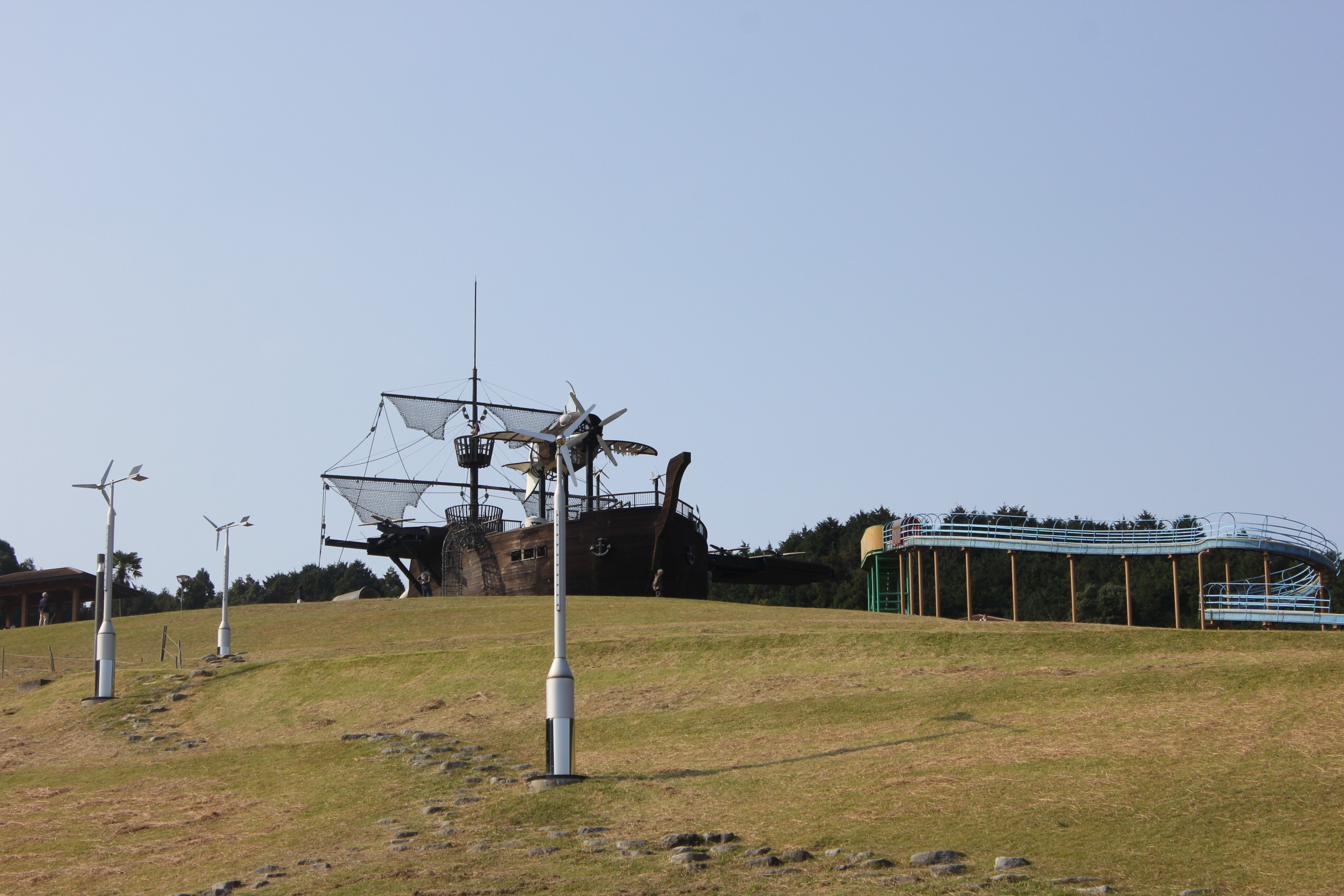 筑紫野市総合公園の帆船型アスレチック